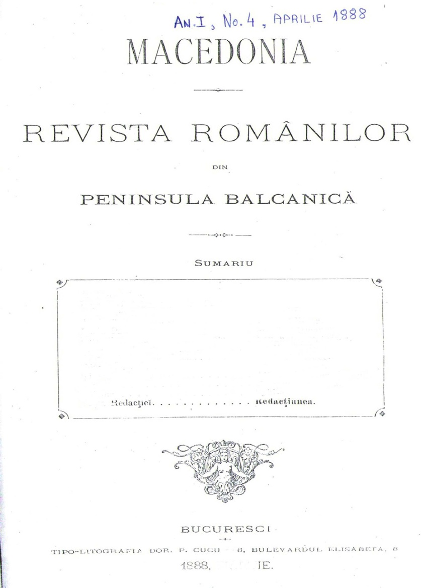 Мачедония, април 1888